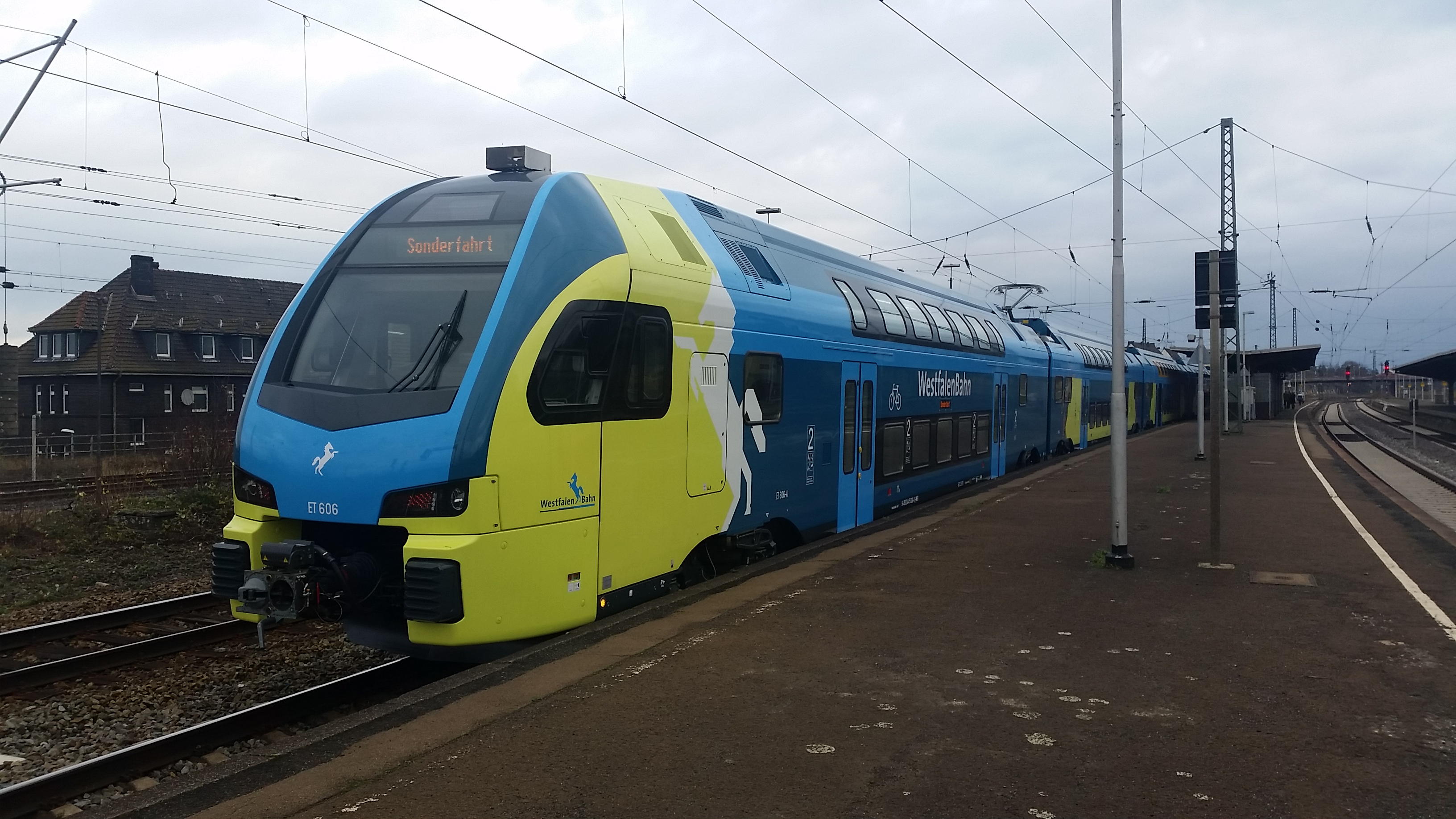 Sonderzug der WestfalenBahn im Bahnhof Löhne (Westf) vor der Übernahme des Streckennetzes EMIL